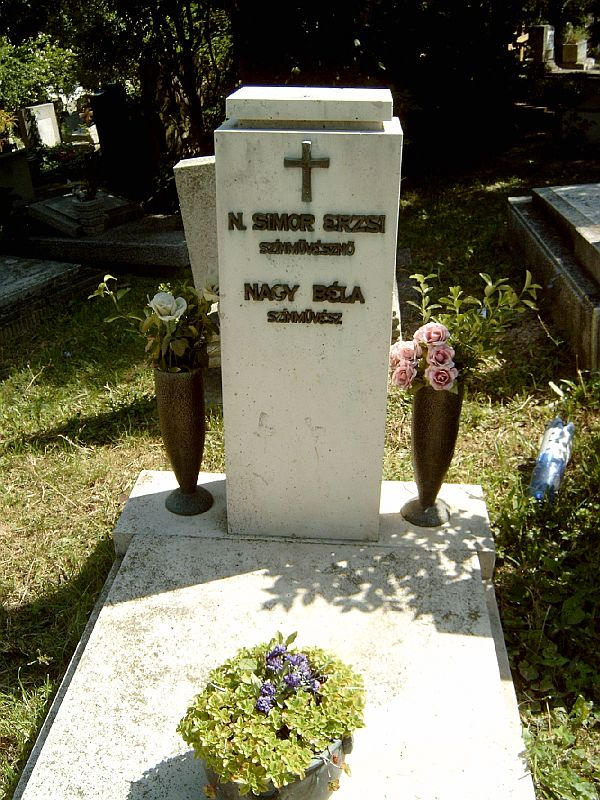 Simor Erzsi (Bp., 1913. júl. 6. – Bp., 1977. febr. 2.) színésznő és férje Nagy Béla színművész sírja Budapesten. Farkasréti temető: 37/2-1-42 [szobrász: Kallós M. Elek].